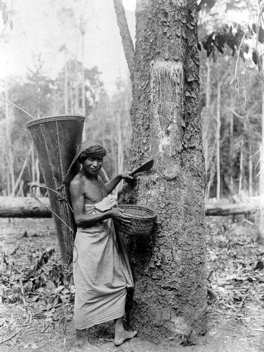 Repronegatief. Kopal is de hars van Agathis dammara (ook wel Agathis alba genoemd), een hoge boom die op een den lijkt. Het is een 'bosbijproduct' waarvan Celebes de grootste exporteur was. Rond 1900 exporteerde Celebes voor ongeveer een miljoen gulden jaarlijks aan kopal. Aan de vooravond van de Crisis van 1929 was dat gemiddeld viermaal zo veel per jaar. Het oorspronkelijke bijschrift bij de foto luidt: "Het oogsten van copal in een mand, om naderhand in den grooten korf, die op de rug wordt gedragen, verder te worden getransporteerd." In de grond rond een oude boom of zelfs op een plek waar ooit een boom gestaan had, vond men soms de zeer gewaardeerde harde kopal. (P. Boomgaard, 2001). Oogst van copal, Celebes, Afd. Luwu